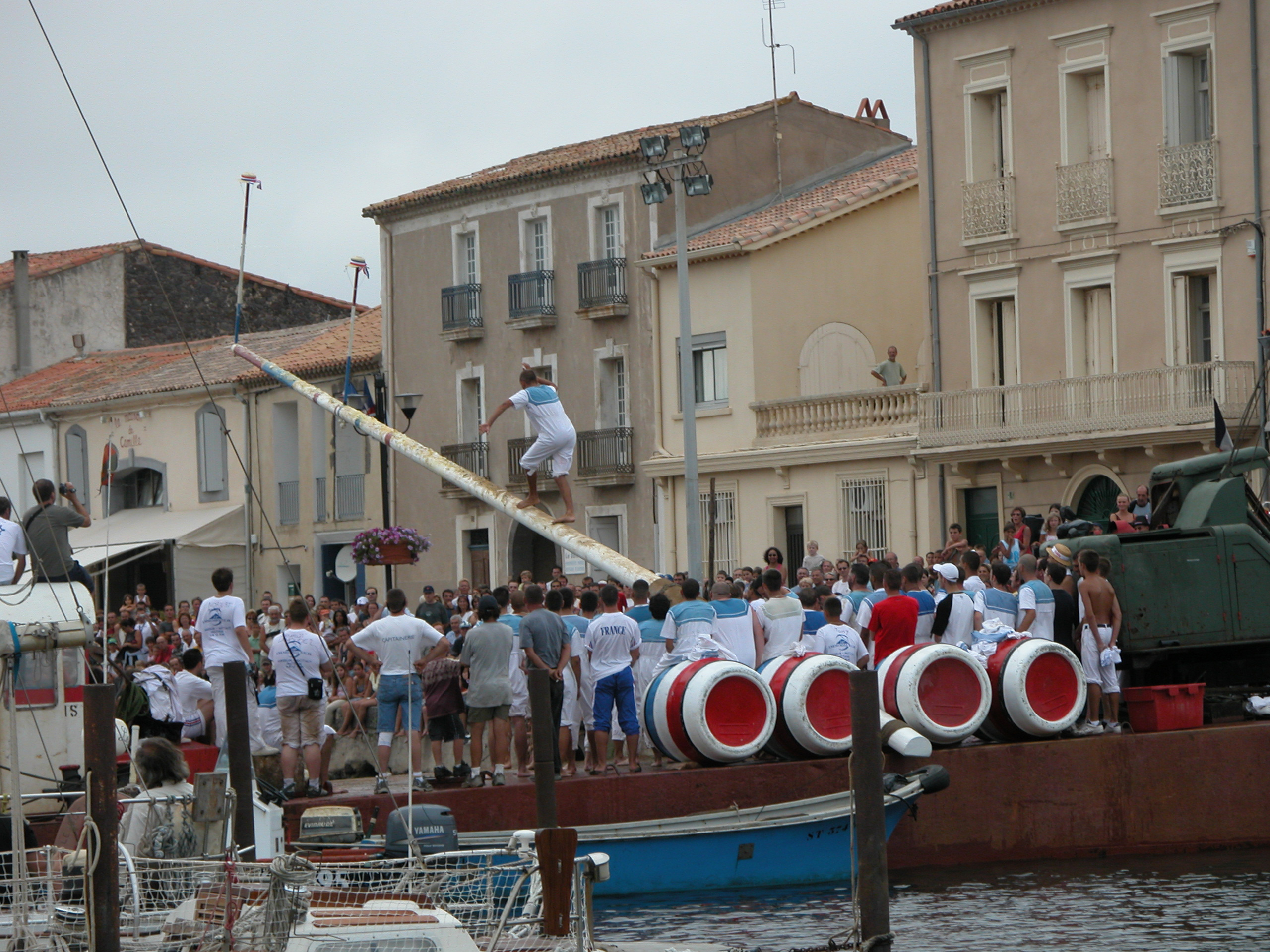 Le Capelet - Marseillan - Photo personnelle.